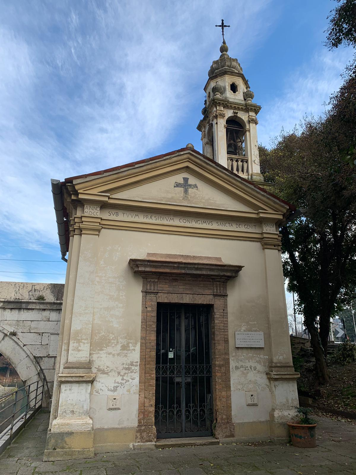 Chiesetta di Santa Maria "Ad Portas Contarenas" oggi, 2019